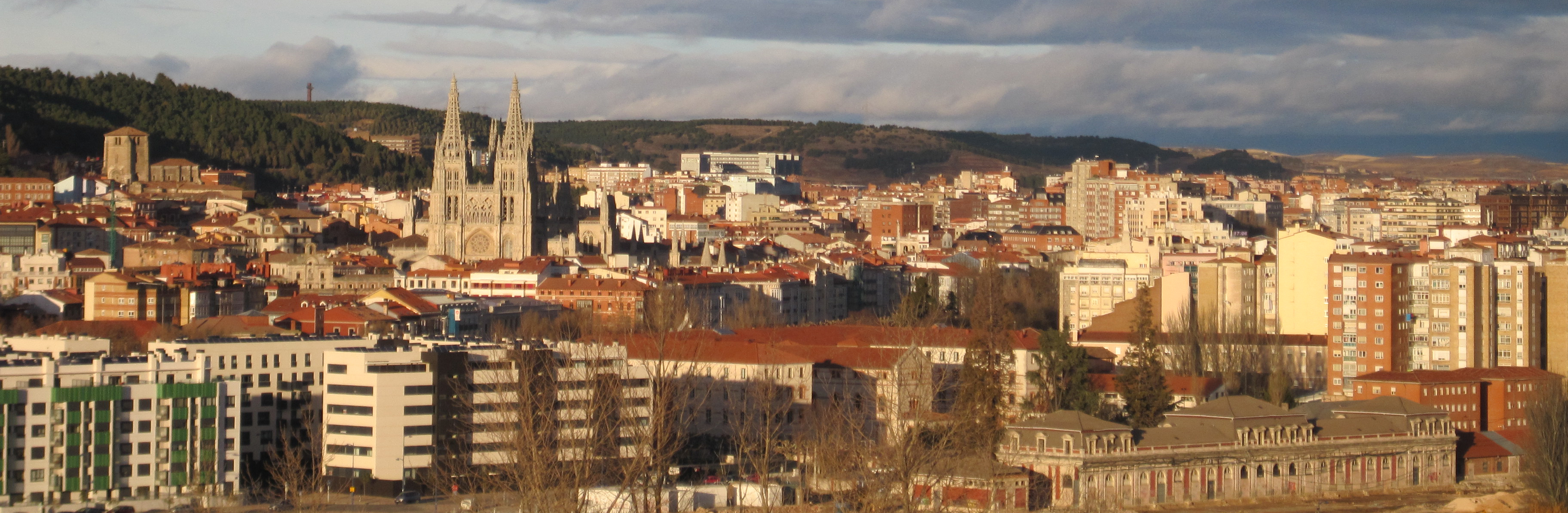 Vista de la ciudad de Burgos desde la antena, en la zona sur.